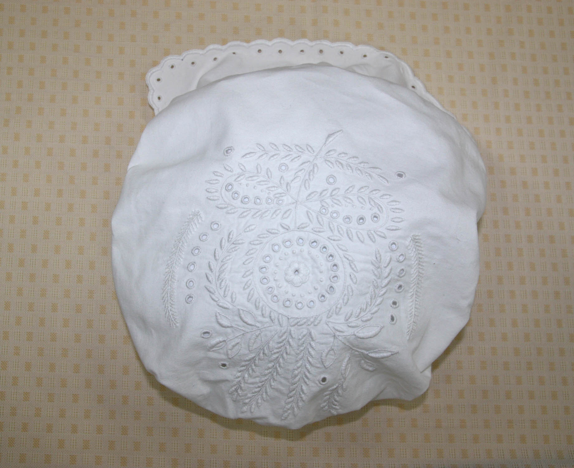 Zdjęcie przedstawia tradycyjny czepiec, ozdobiony haftem kujawskim. Hafciarka, Alicja Jakubowska, posiada tytuł twórcy ludowego. Fotografię wykonano podczas zajęć animacyjnych dla pokolenia 50+ w ramach projektu Polska Cyfrowa Równych Szans w Gminnej Bibliotece Publicznej w Rojewie.